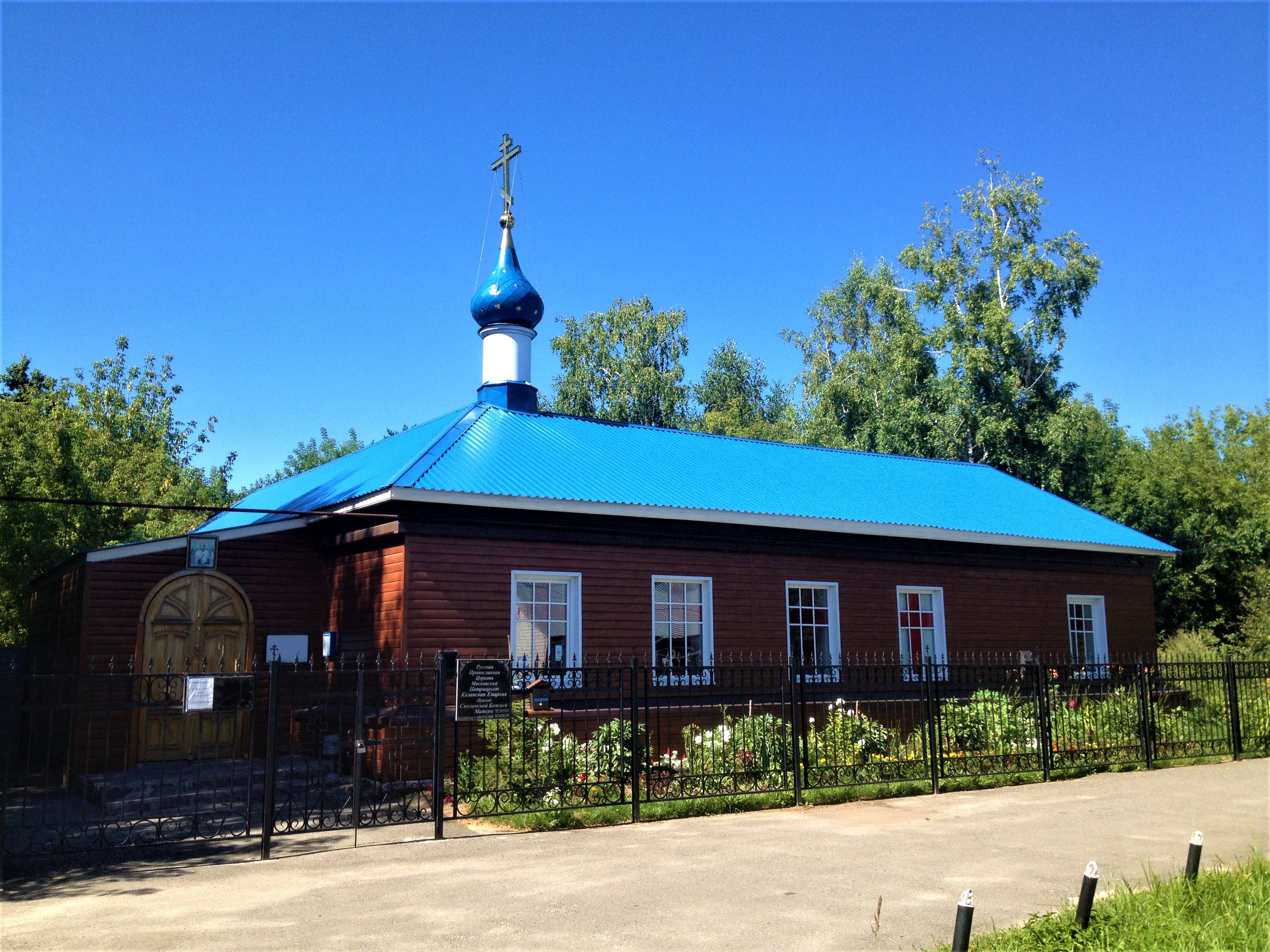 Храм Во имя Смоленской иконы Божией Матери (г. Казань, посёлок Сухая Река, ул. Малая Заречная, д. 13 а).